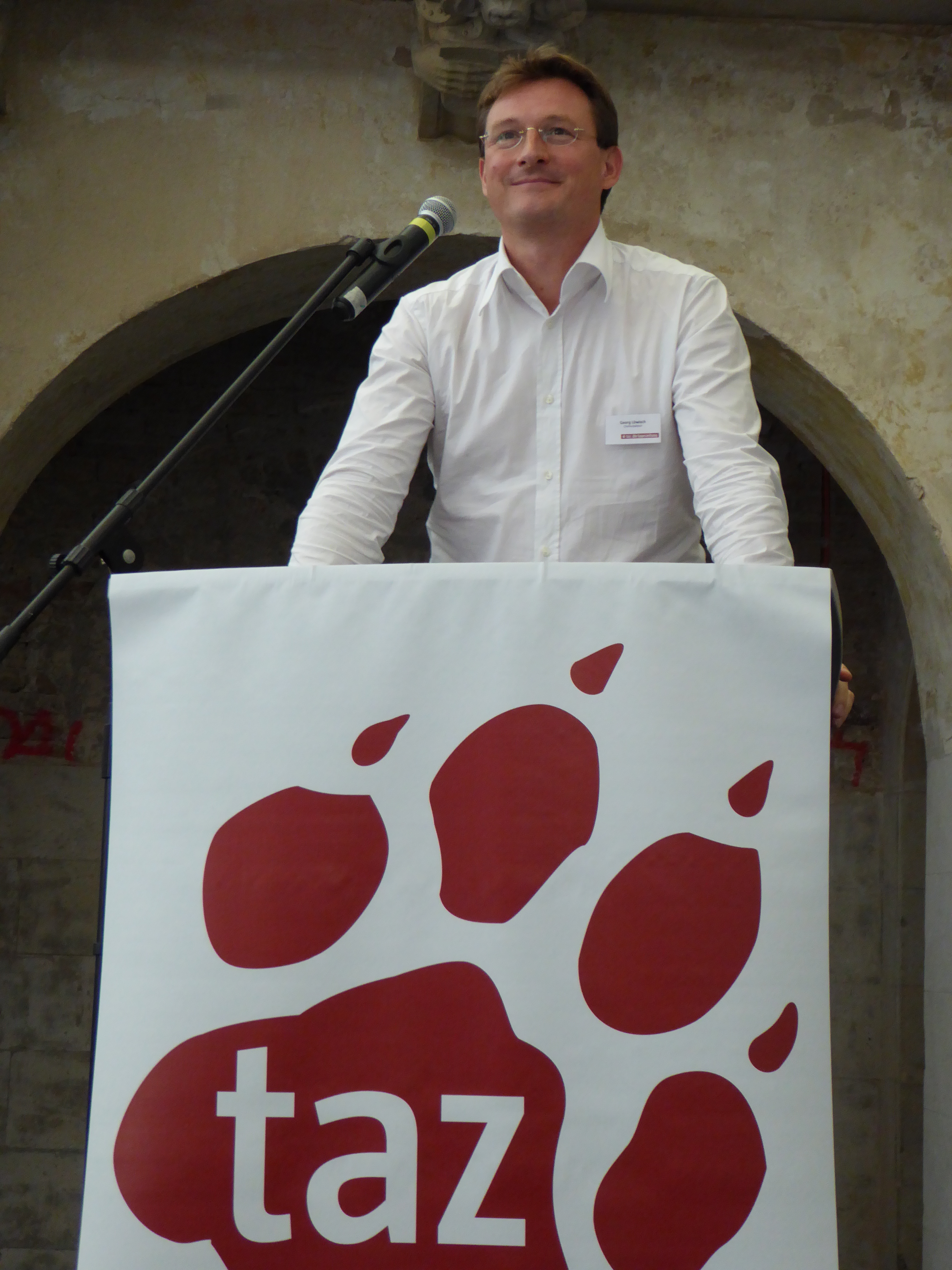 Georg Löwisch während der Generalversammlung 2015 der taz Genossenschaft